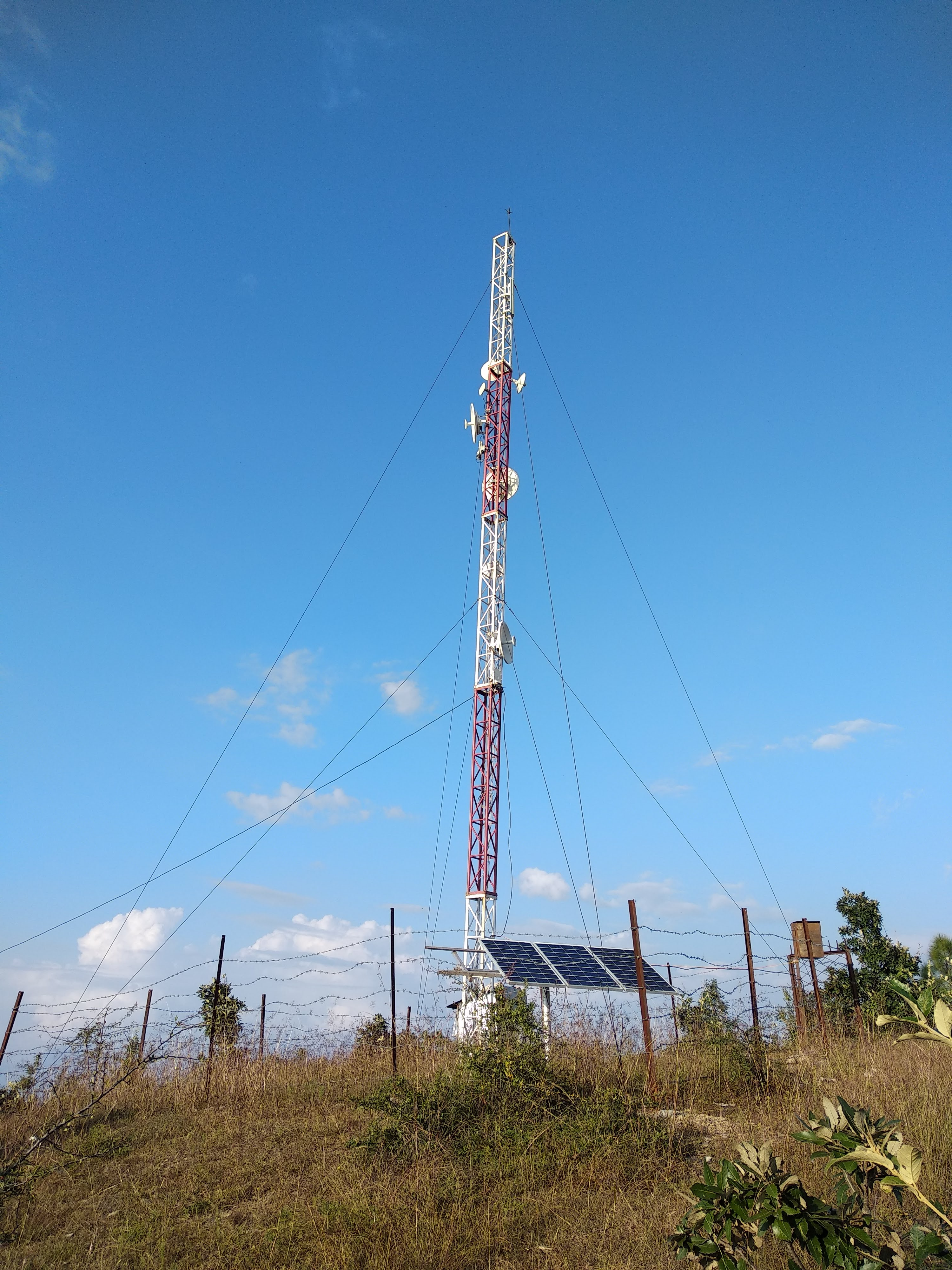 नेपाली: ग्रामीण दूरसञ्चार विकास कोष परिचालन गरेर ब्रोडब्याण्ड एक्सेस नेटवर्क परियोजना अन्तर्गत बैतडी जिल्लाको देहिमाण्डाैँमा निर्माण गरिएको संरचना